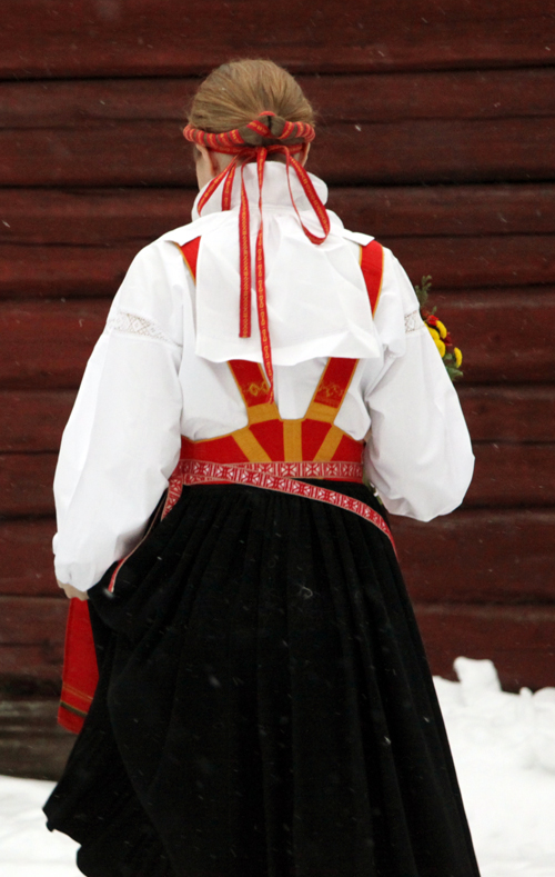 Fotografi av sollerödräktens baksida